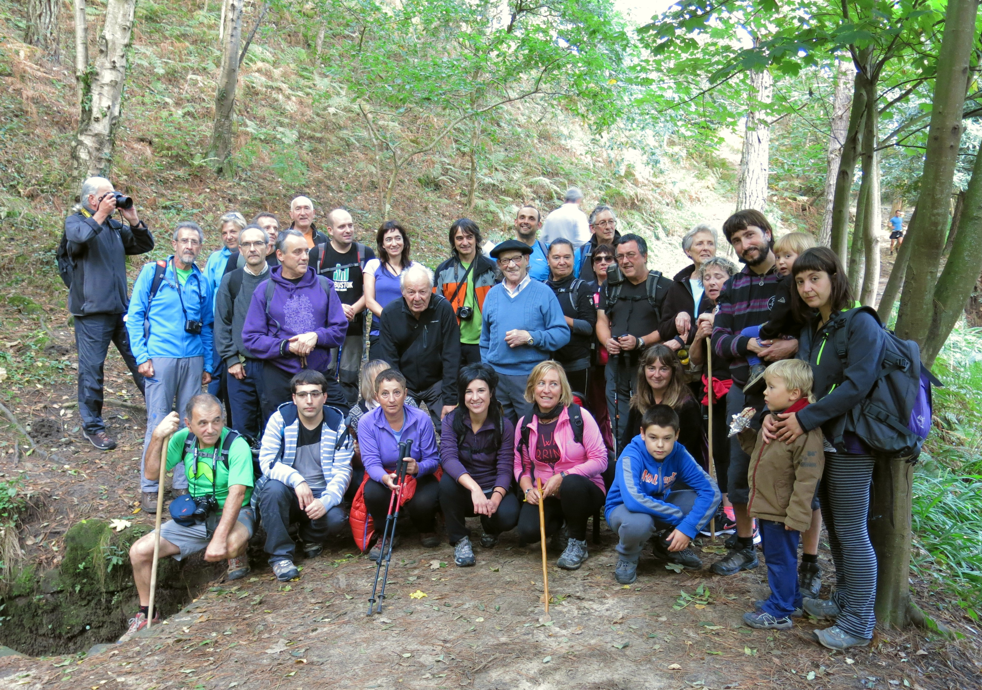 Josetxo Mayor en el homenaje que le organizó el suplemento MENDIA de GARA" en 2014. (Foto.: JM Alquezar)